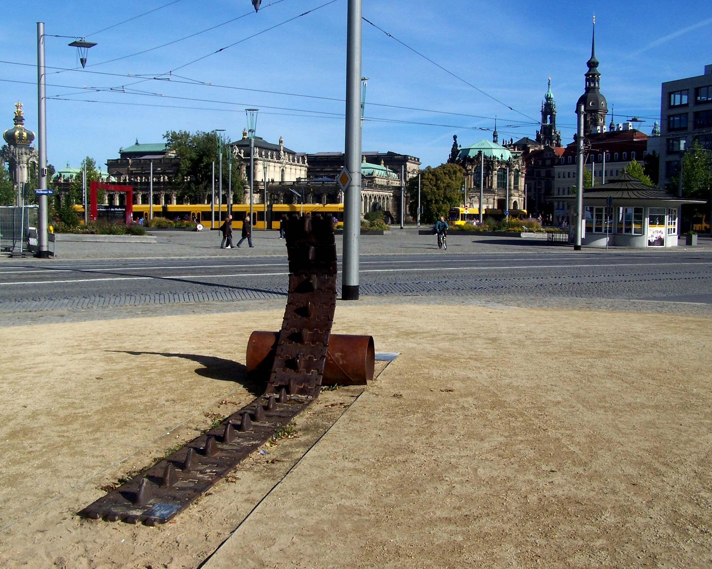 Panzerketten-Denkmal zum Gedenken an den Volksaufstand vom 17. Juni 1953 auf dem Postplatz in Dresden